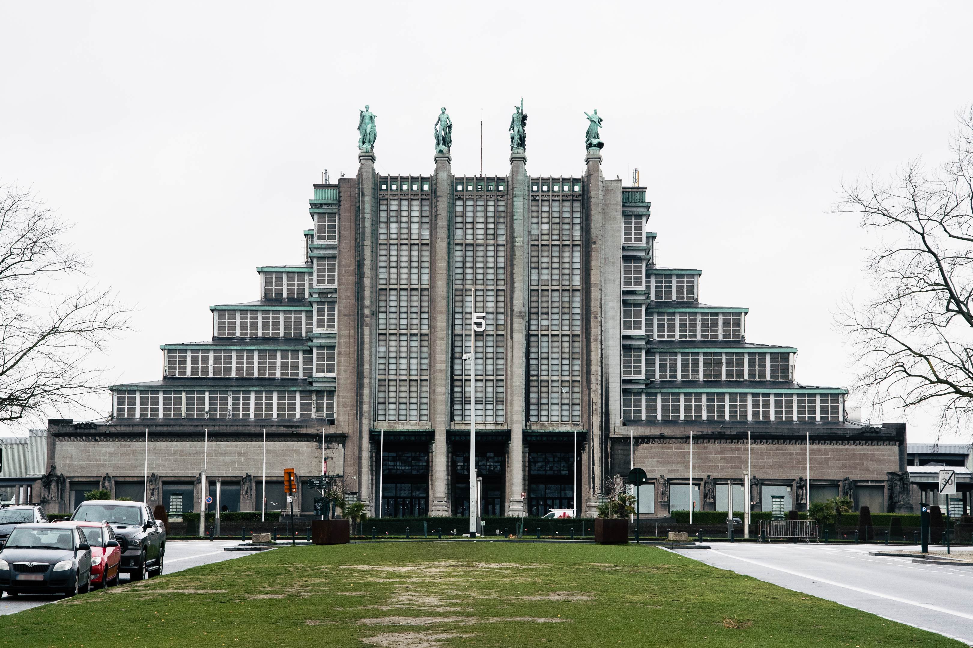 Lieu d'expositions, foires et évènements